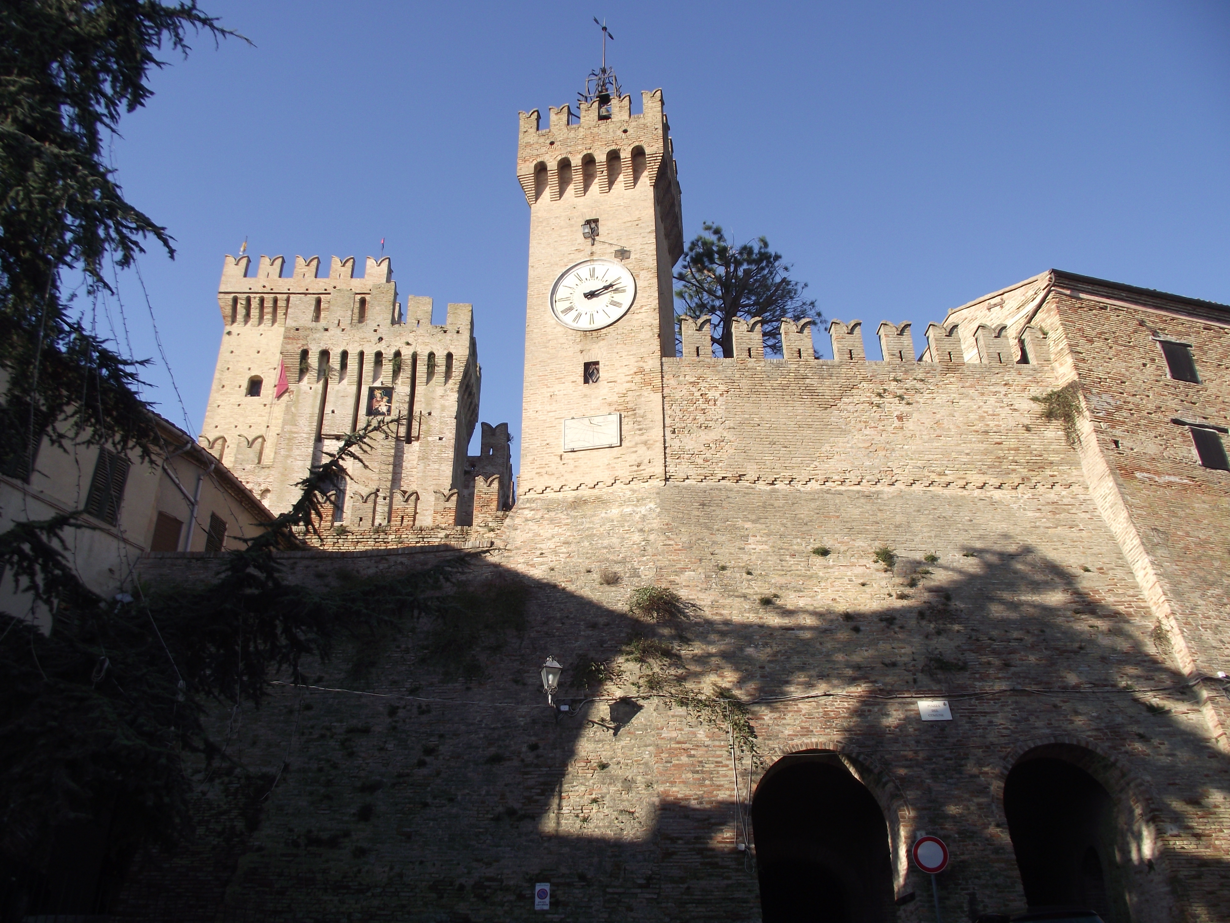 Offagna, Rocca, 1454